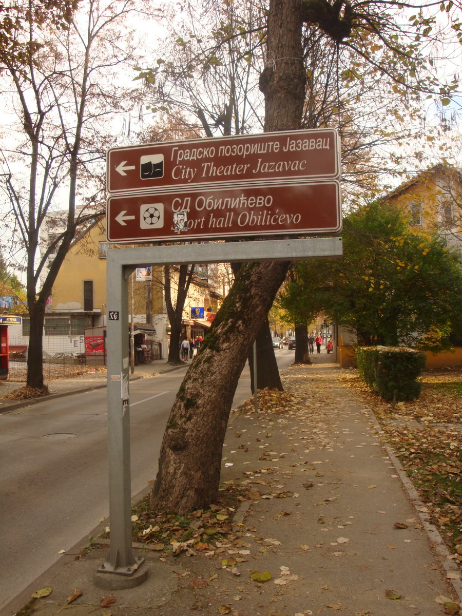 Путоказ_ГП_Јазавац_и_СД_Обилићево